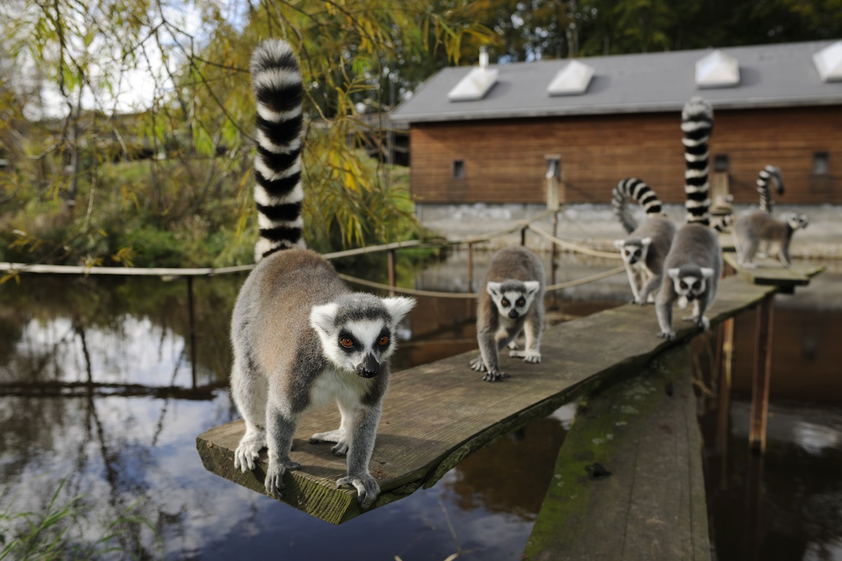 Katta lemur i Ree Park